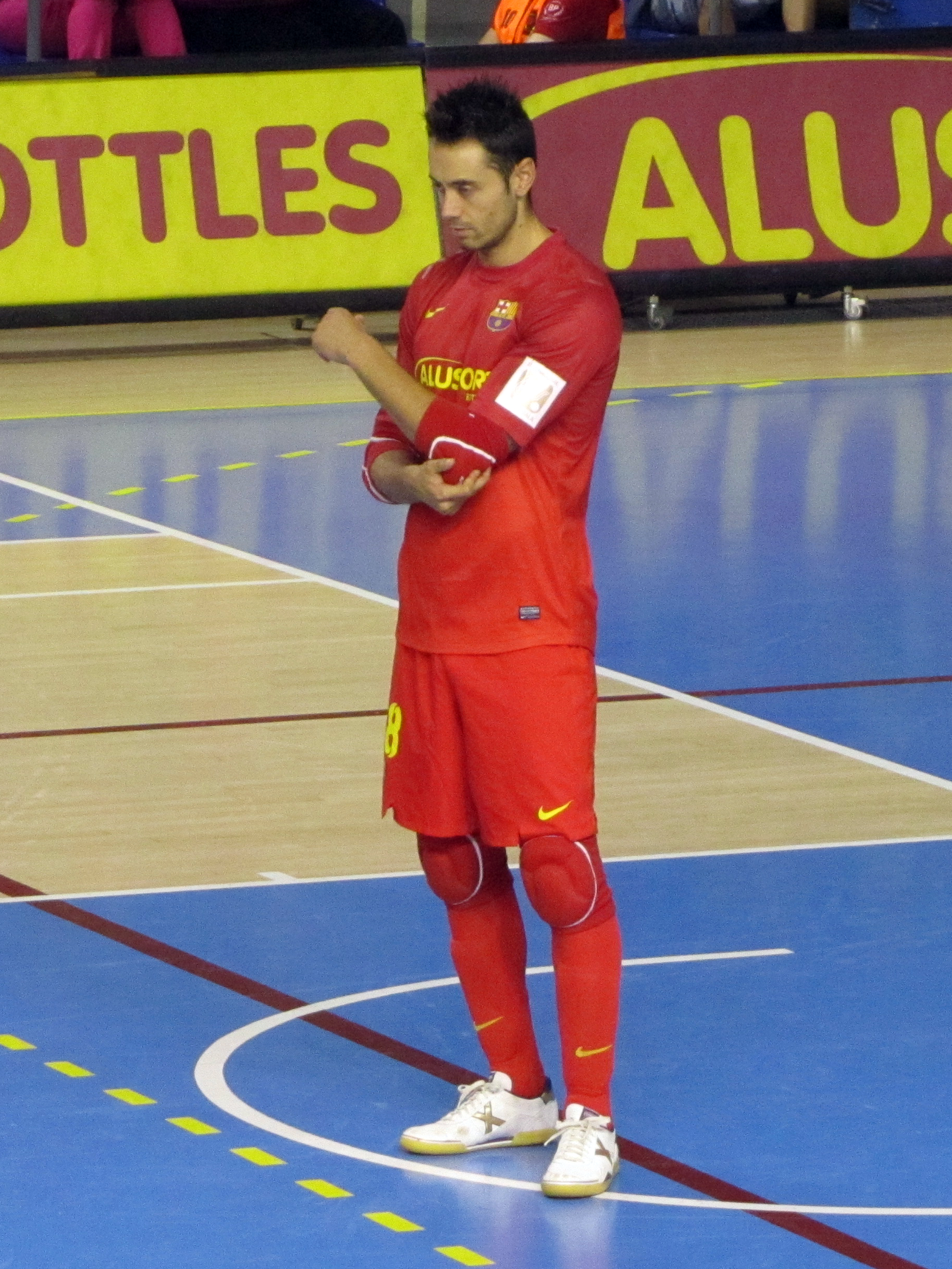 Foto realizada por Javier Segura (@castroquini en Twitter)